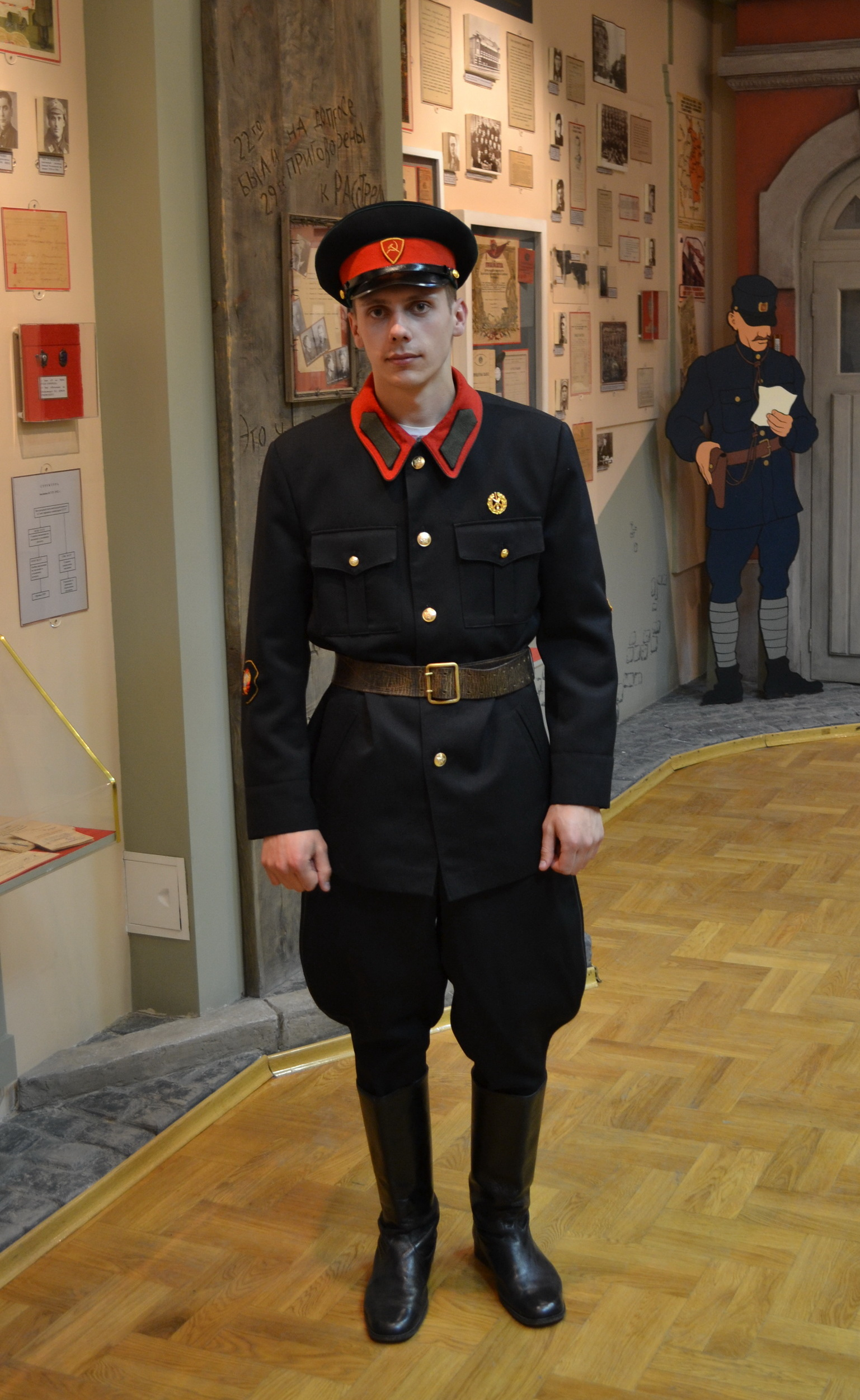 Беларуская (тарашкевіца): Вікісустрэча ў Менску 17 траўня 2014